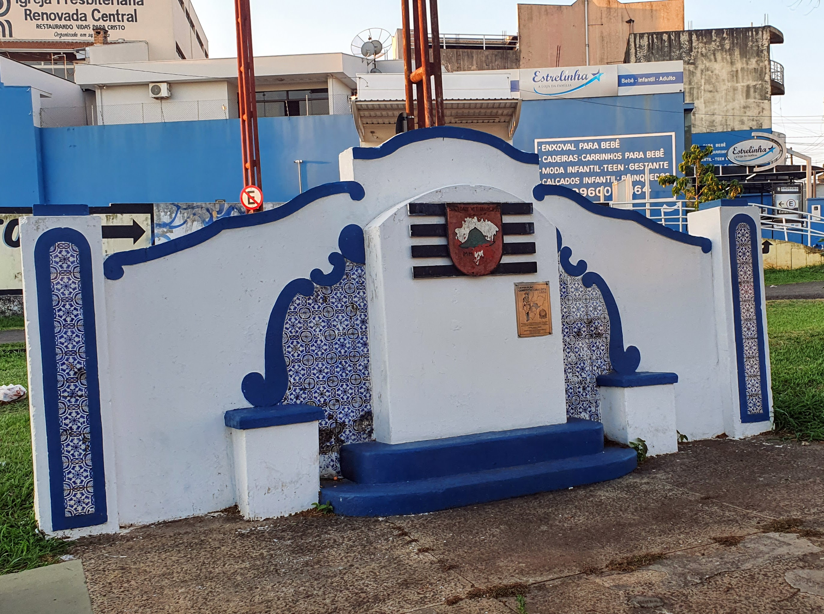 Monumento em homenagem ao Soldado Constitucionalista na Travessa Erasmo Mercadante